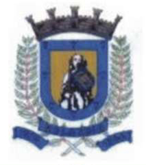 Brasão de Rolândia - Paraná